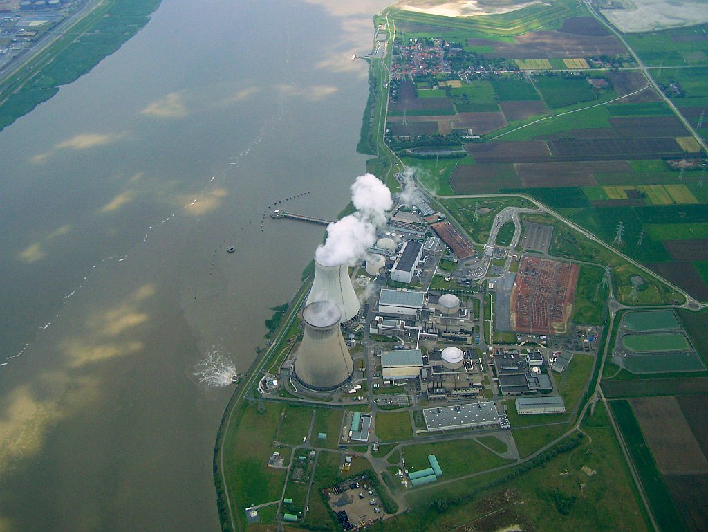 Luchtfoto Kerncentrale Doel, gezien vanuit het noorden